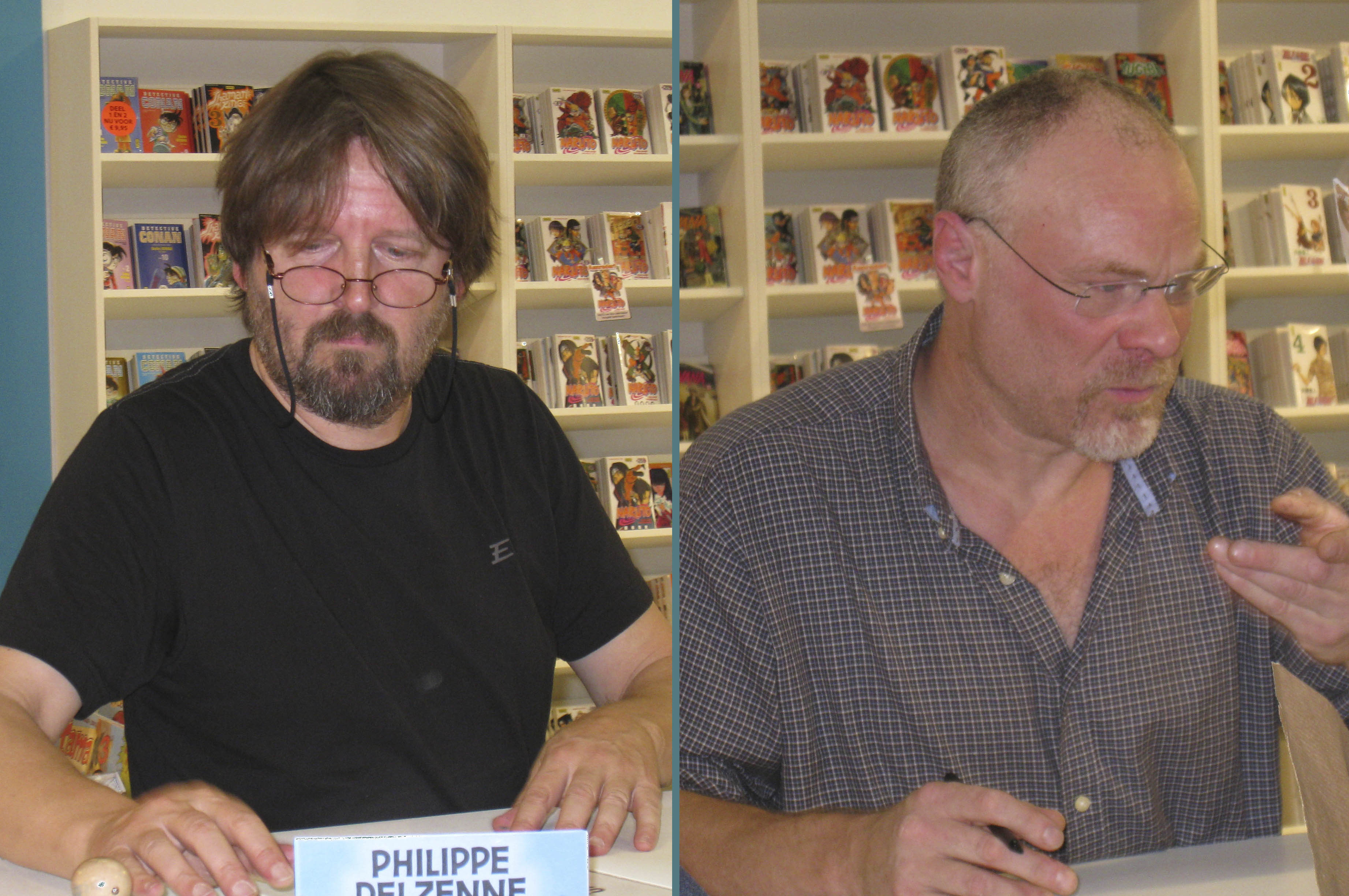 Gerd Van Loock & Philippe Delzenne tijdens een signeersessie op de Boekenbeurs in Antwerpen op 06-11-2010.